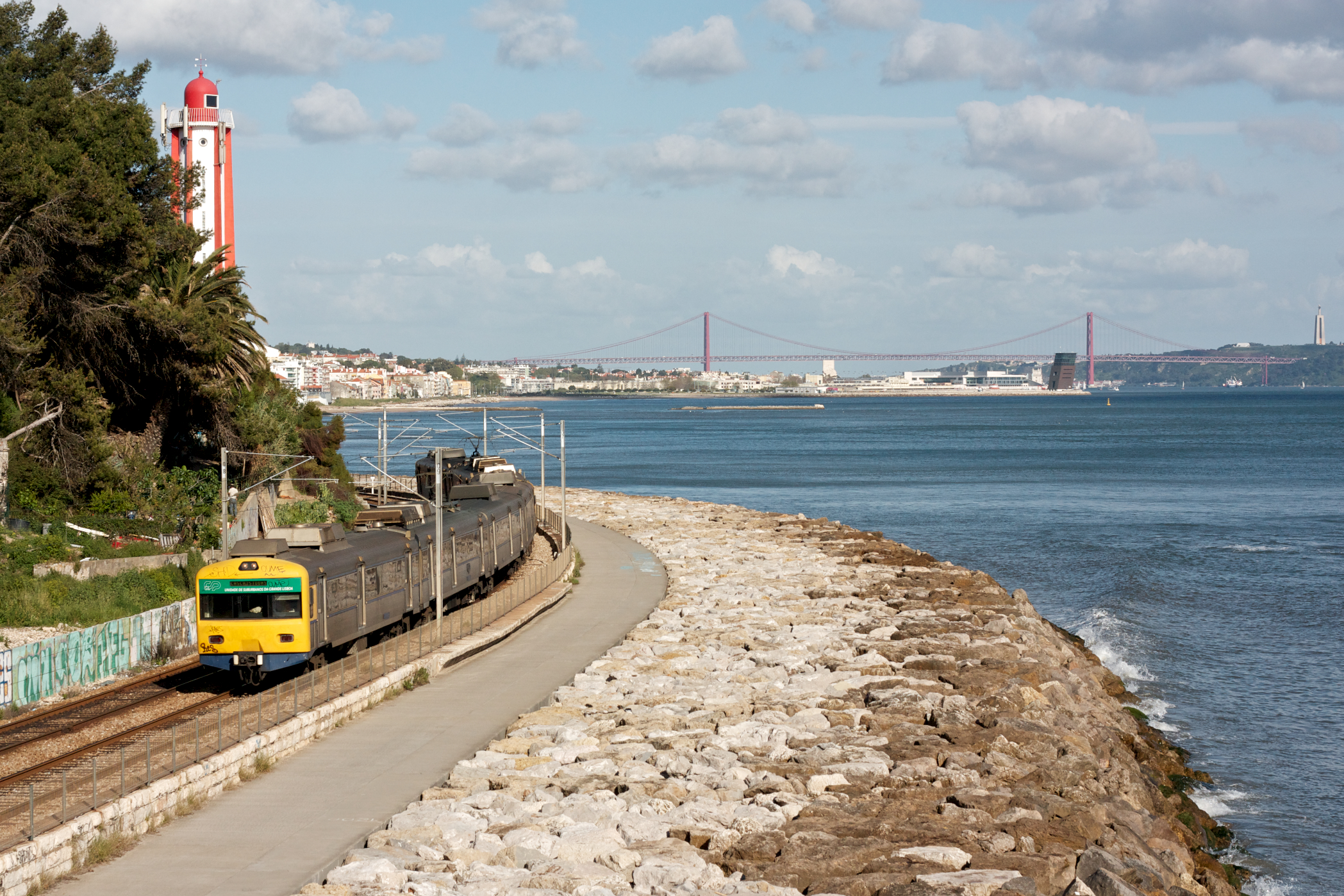 Tipo: Comboio Urbano 19075 [Cais do Sodré - Cascais] Local: Gibalta (Caxias) [Linha de Cascais, PK 11] Data e hora: 3 de Abril de 2011 [17h36] Material: Automotoras 3258 e 3263 [Unidade Quádrupla Eléctrica + Unidade Tripla Eléctrica] esta fotografia foi publicada no . [ENG] Commuter train to Cascais.